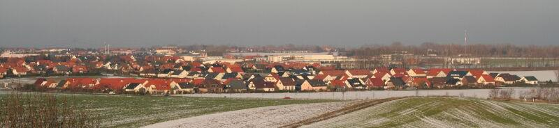 Irxleben: Panorama Gewerbegebiet+neue Wohngebiete Dez 2005, Bild selbst gemacht